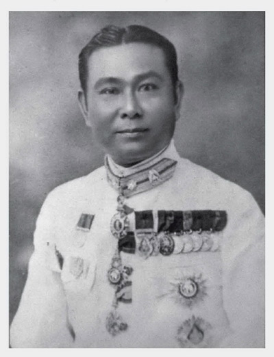 พระยาอภิรักษ์ราชอุทยาน (ทิตย์ ณ สงขลา) (พ.ศ. 2422 - 2514)